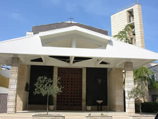 vista frontale della attuale chiesa SS Maria del carmine